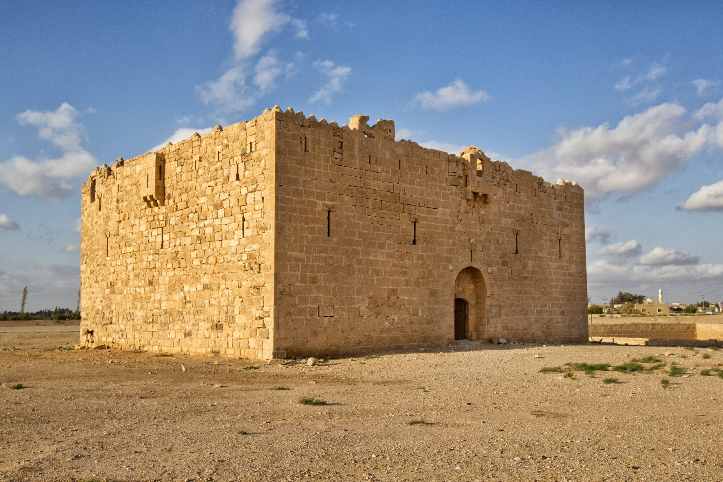 Qatrana Castle